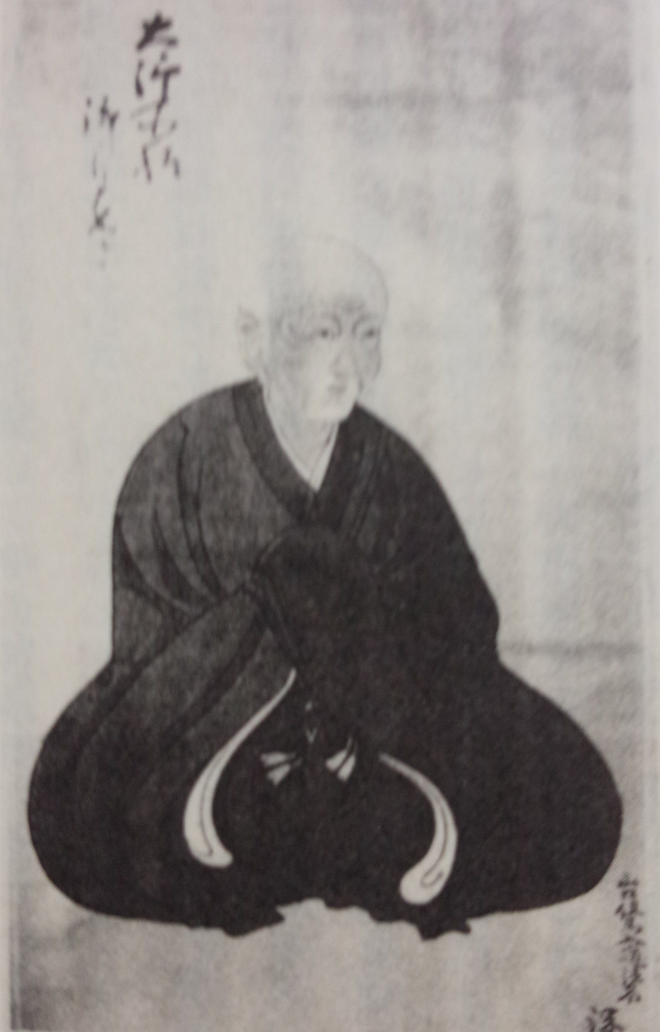 山口重政の肖像。